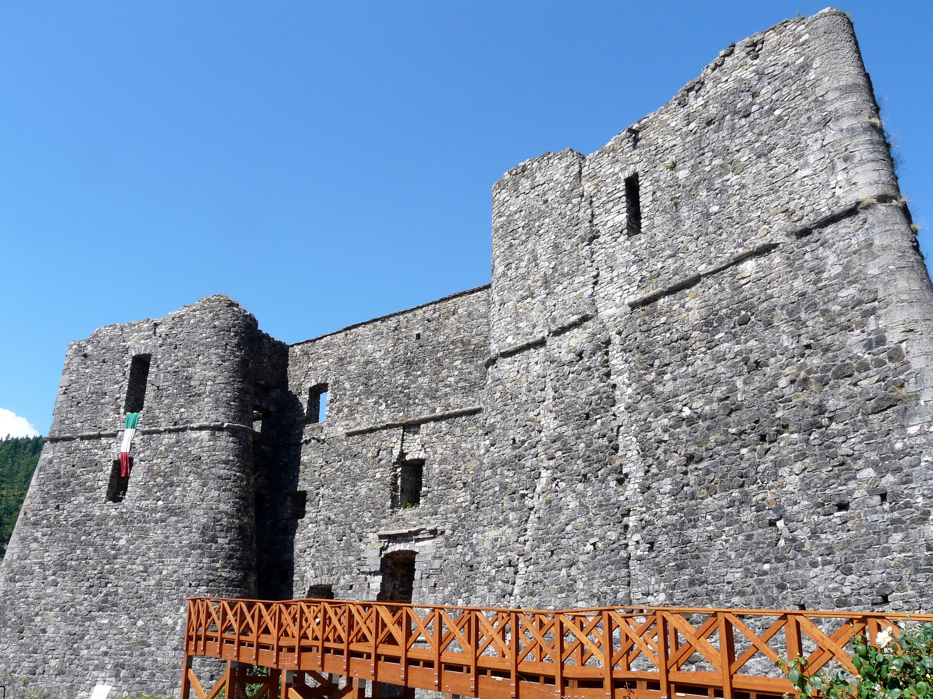 Serie di immagine del castello di Santo Stefano d'Aveto, Liguria, Italia